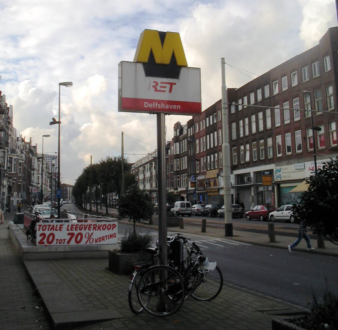 Metrostation Delfshaven, ingang.